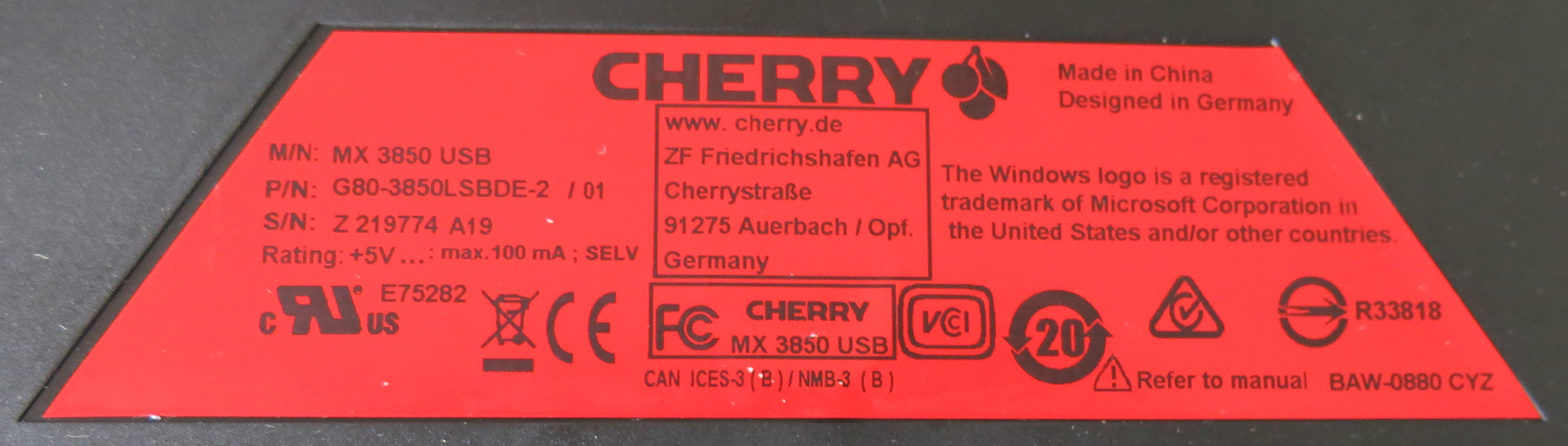 Falsches CE-Zeichen auf einer Tastatur Cherry MX 3850 USB